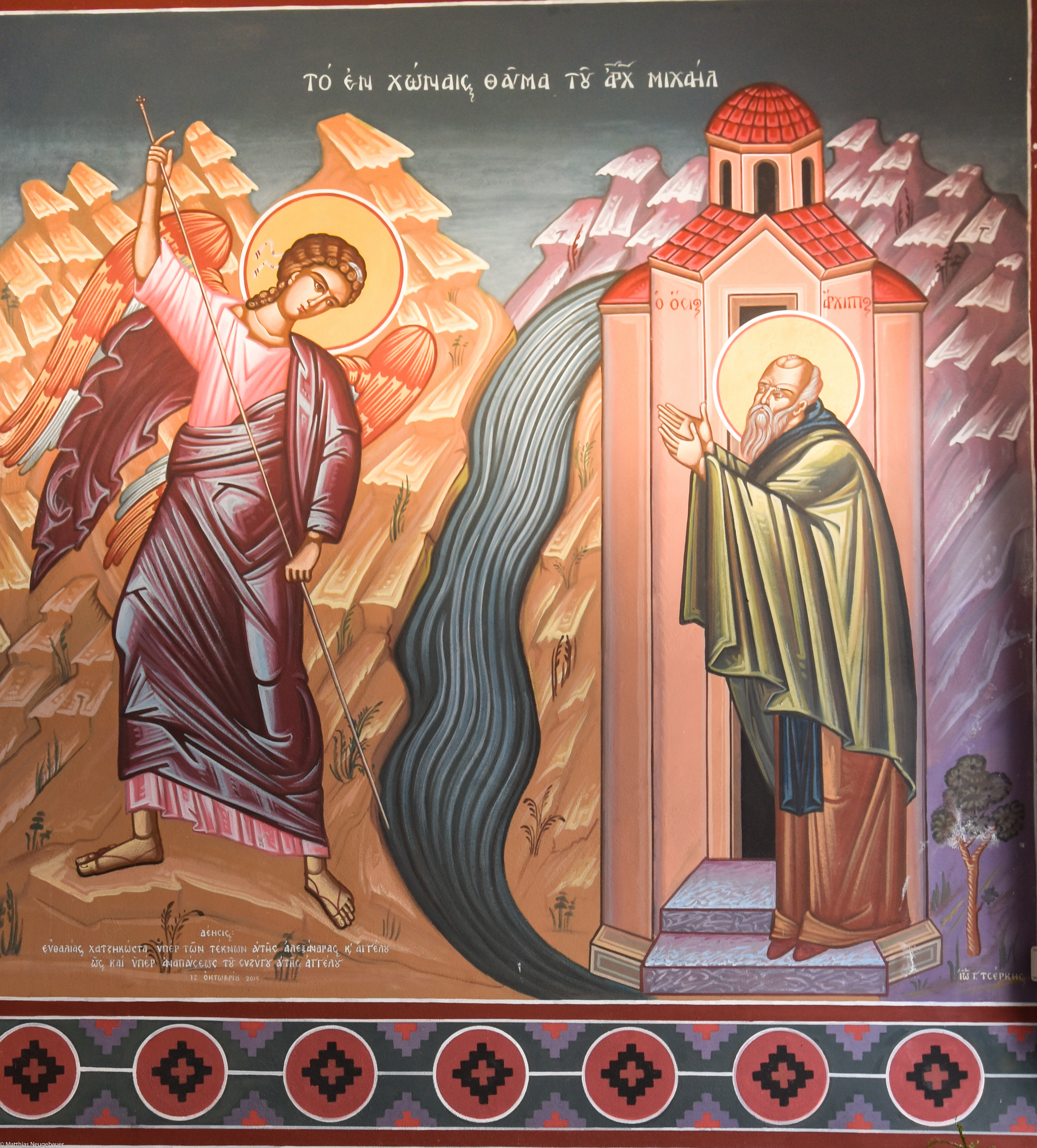 Abbildung des Wunders von Chonais durch den Heiligen Erzengel Michael im Kloster Panormitis auf der Insel Symi